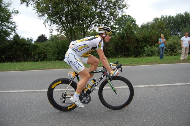 André Greipel, Vattenfall Cyclassics 2010, km 111,7, Pinneberg-Süd